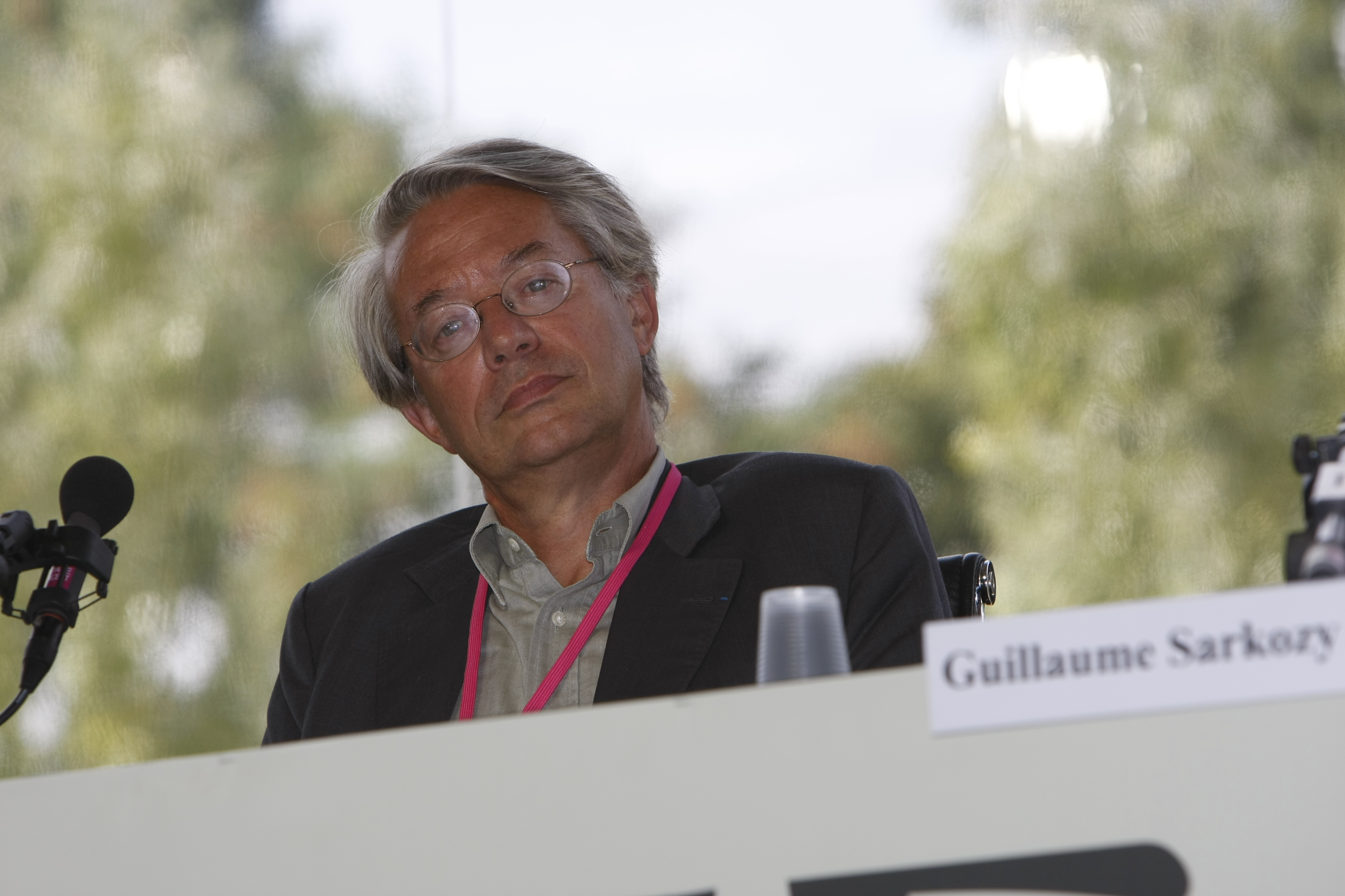 Philippe Marini